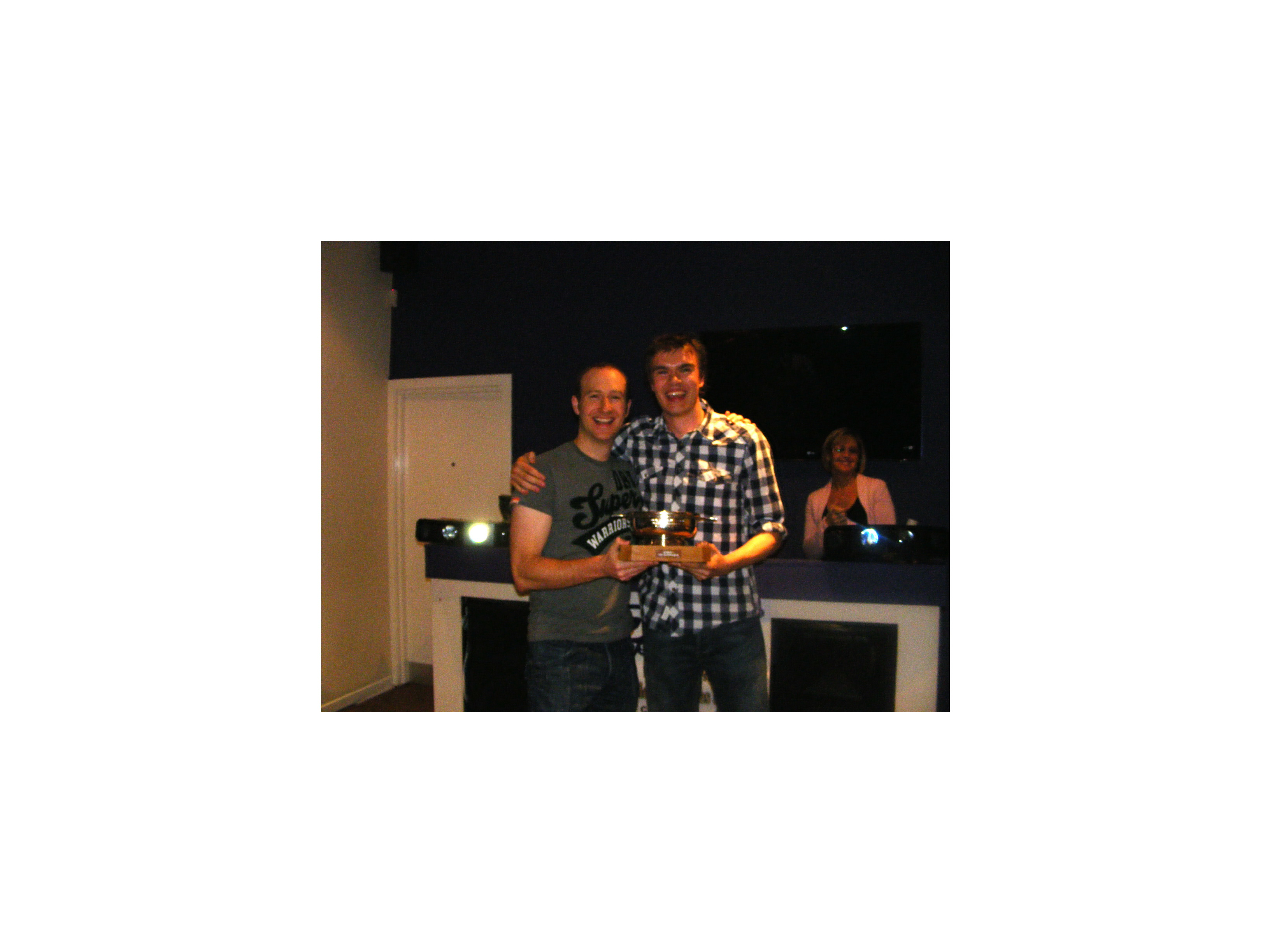 Alan Krawczyk i Vincent Lyle z pucharem "Celtic Cup".